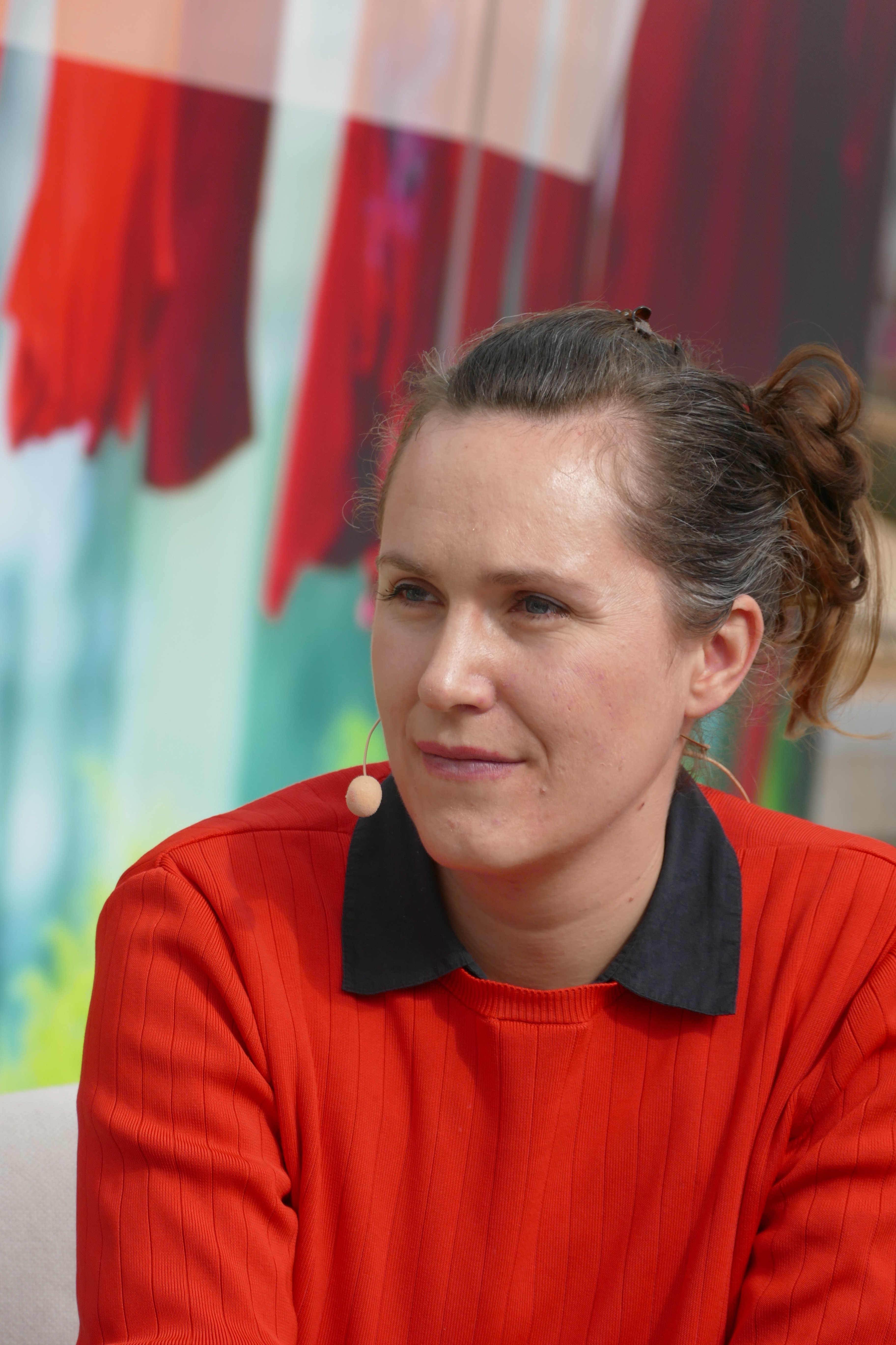 Barbi Marković auf am ARTE-Stand auf der Leipziger Buchmesse in einem Gespräch über den Adelbert-von-Chamisso-Förderpreis 2017, den sie erhalten hat.